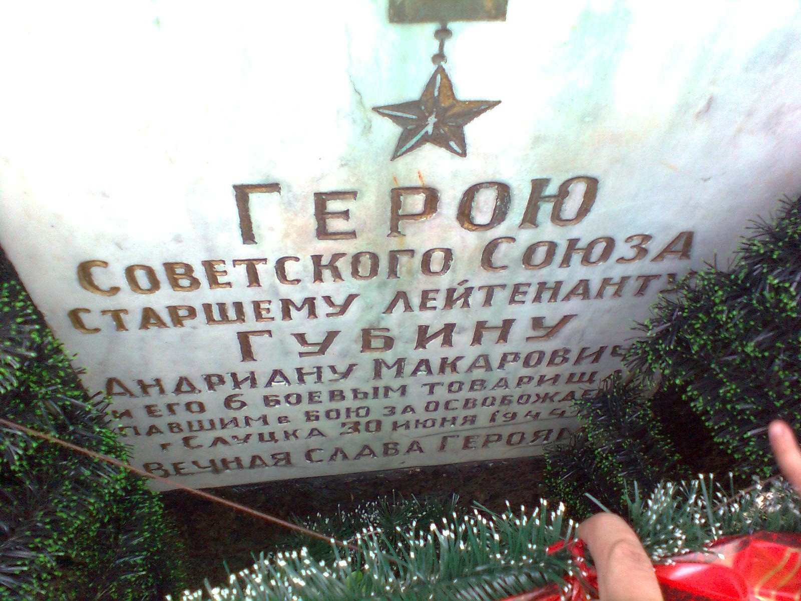 Надпись на памятнике.